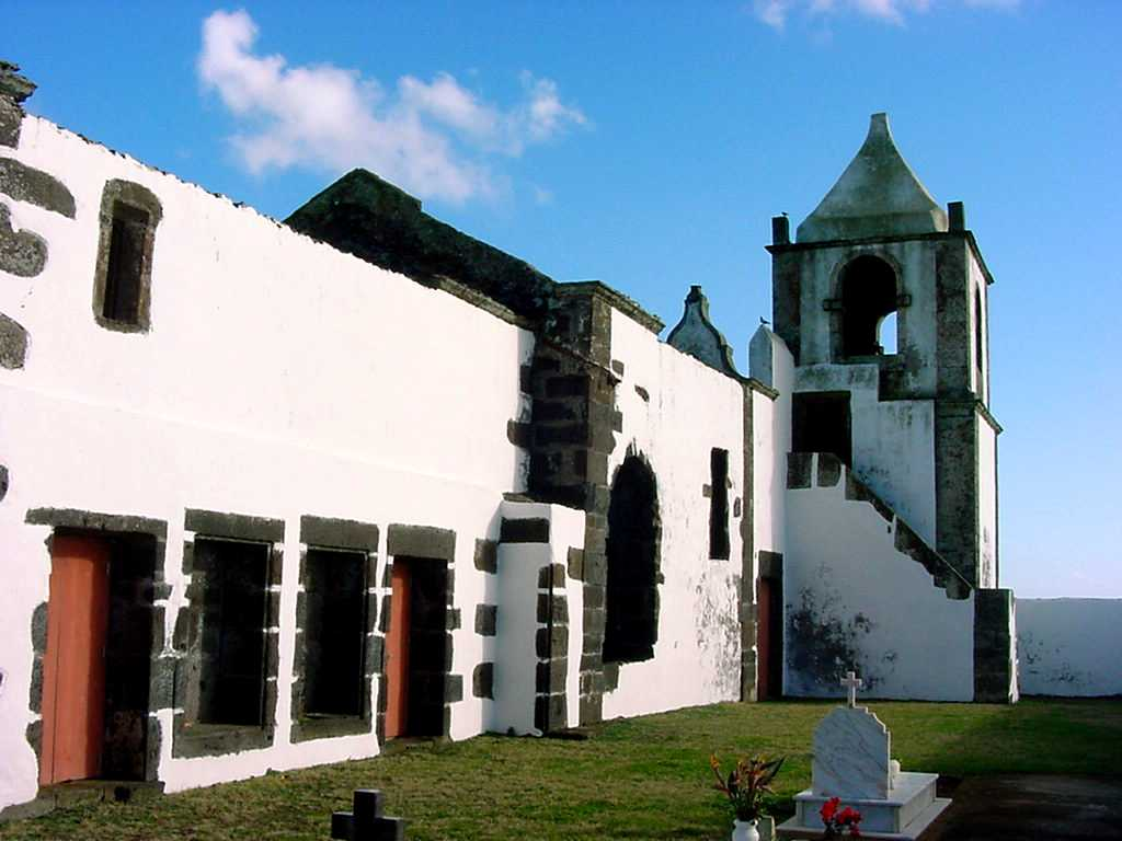 Igreja Velha de São Mateus da Calheta, Exterior, São Mateus da Calheta, ilha Terceira, Açores, Portugal.